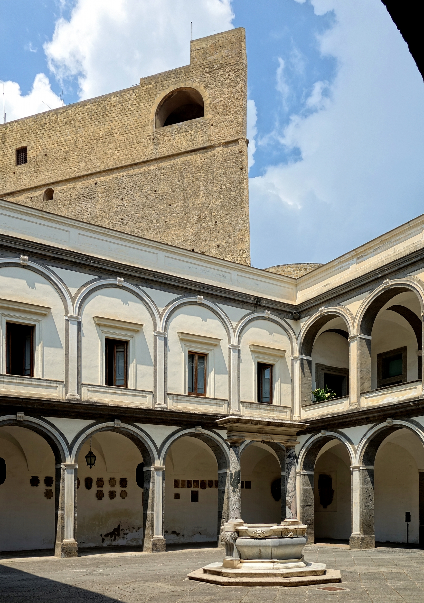 Le Chiostro dei Procuratori de la chartreuse di San Martino à Naples.